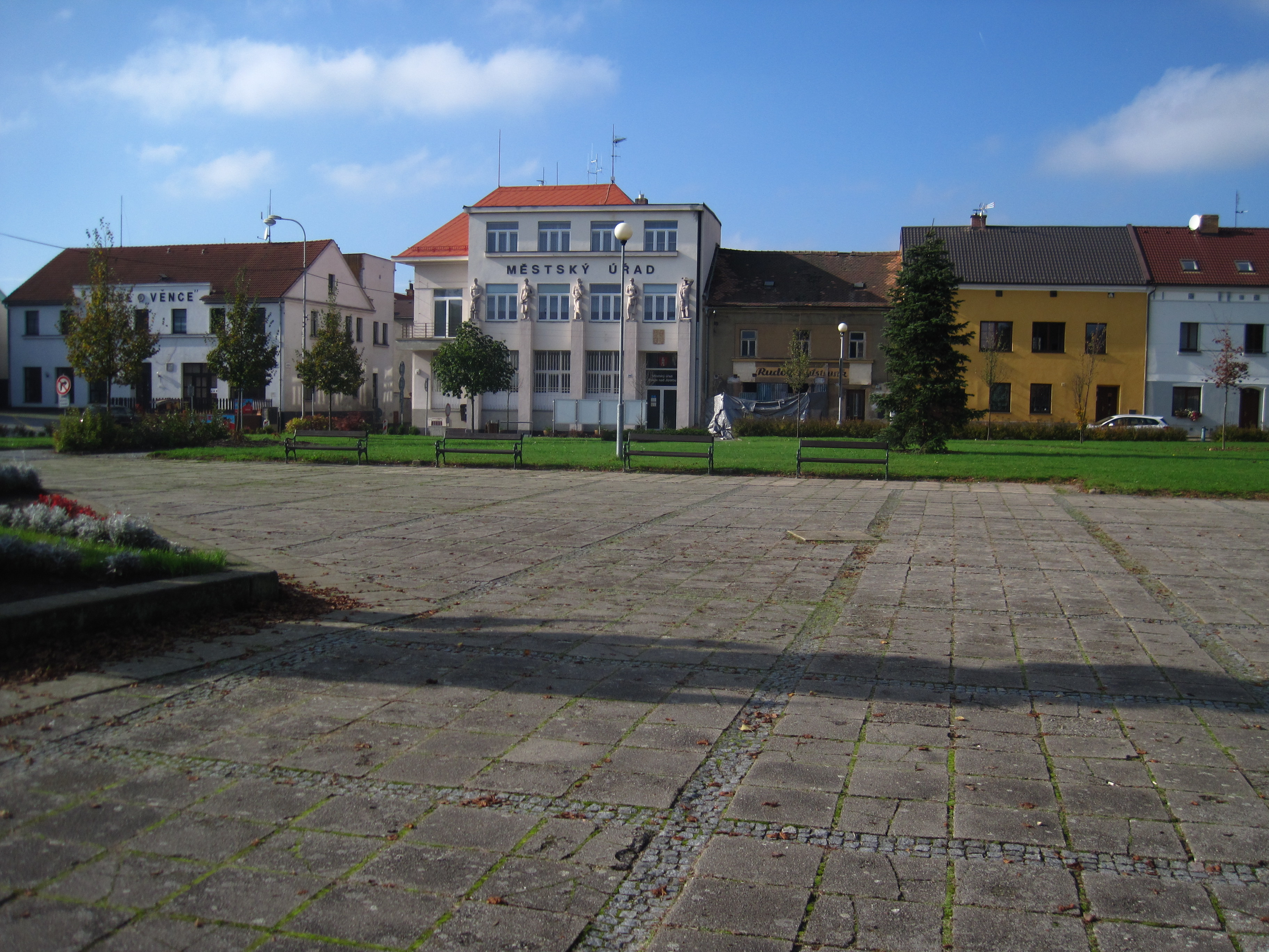 Bakov nad Jizerou - Mírové náměstí